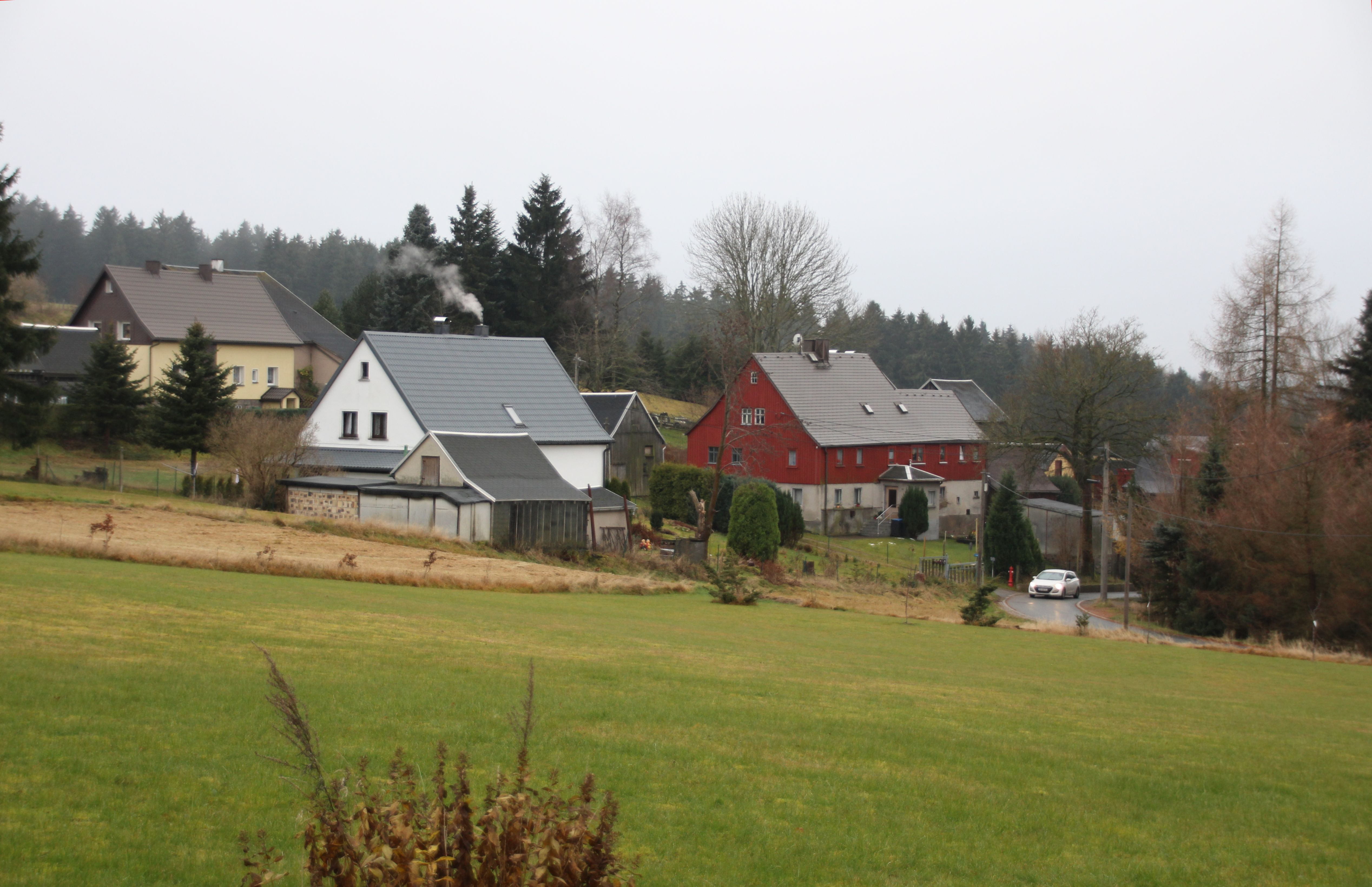 Der Heinzwinkel ist ein Ortsteil der im westlichsten Zipfel des sächsischen Erzgebirges gelegenen Gemeinde Schönheide (Erzgebirgskreis). Dieser Ortsteil liegt im süd-westlichen Teil von Schönheide und wird durch die Wiesenstraße erschlossen. Das Gelände fällt vom südlichen Rand der kleinen Siedlung nach Westen hin ab in Richtung Tannenbach, dessen Osthang als Fächennaturdenkmal ausgewiesen ist und unter Schutz steht (Paragraph 18 des Sächsischen Naturschutzgesetzes Text bei Sachsen.de) Paragraph 28 des Bundesnaturschutzgesetzes, auf den das sächsische Gesetz verweist, lautet: „§ 28 Naturdenkmäler (1) Naturdenkmäler sind rechtsverbindlich festgesetzte Einzelschöpfungen der Natur oder entsprechende Flächen bis zu fünf Hektar, deren besonderer Schutz erforderlich ist 1. aus wissenschaftlichen, naturgeschichtlichen oder landeskundlichen Gründen oder 2. wegen ihrer Seltenheit, Eigenart oder Schönheit. (2) Die Beseitigung des Naturdenkmals sowie alle Handlungen, die zu einer Zerstörung, Beschädigung oder Veränderung des Naturdenkmals führen können, sind nach Maßgabe näherer Bestimmungen verboten.“